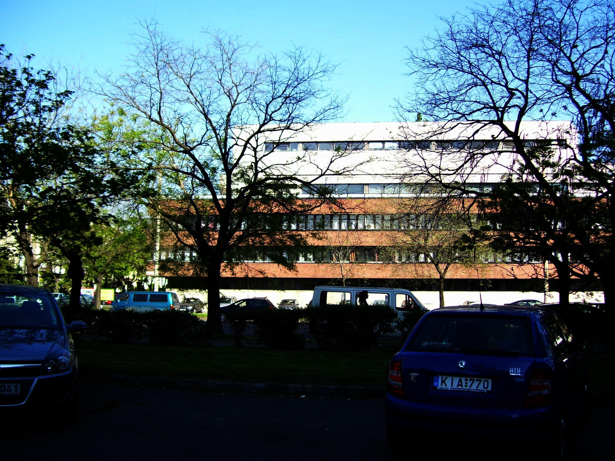 A Villamoserőmű Tervező és Szerelő Vállalat (VERTESZ) irodaháza, Budapest XI., Fehérvári út 108-114. (tervezte Rimanóczy Jenő)